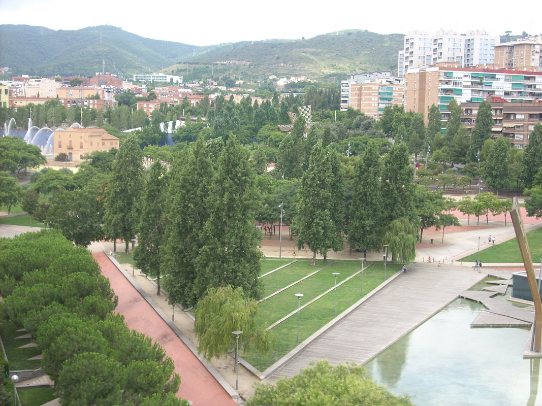 Vista aerea del Parque Central de Nou Barris